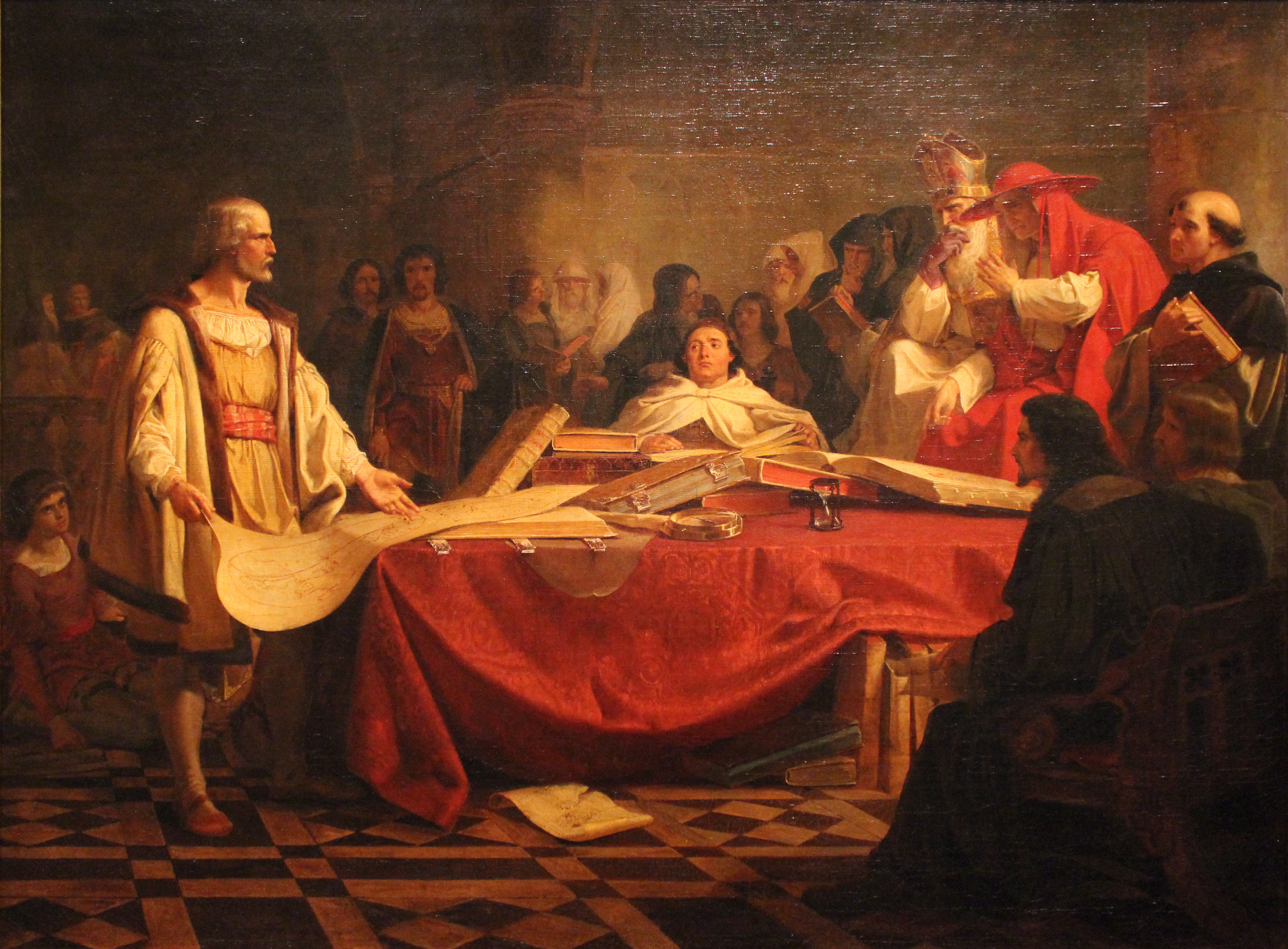 Christophe Colomb devant le conseil de Salamanque, peinture d'Emanuel Leutze en 1841, exposé au Musée des beaux-arts de Lyon en 2014.